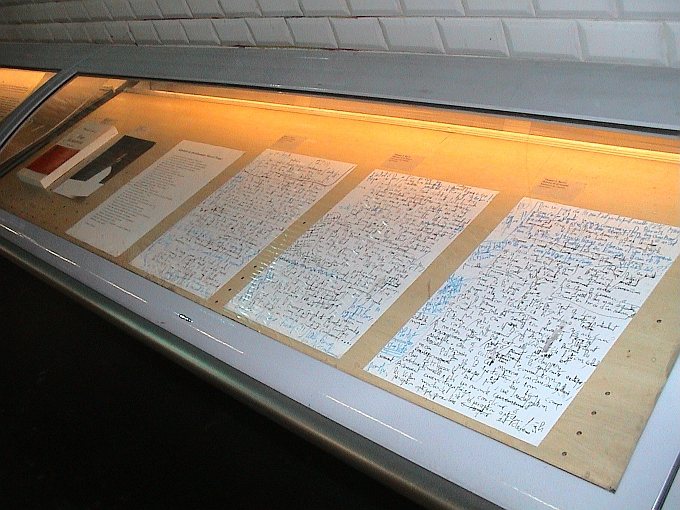 Exposition des manuscrits de l'écrivain Thomas Ravier au métro Saint-Germain des Prés